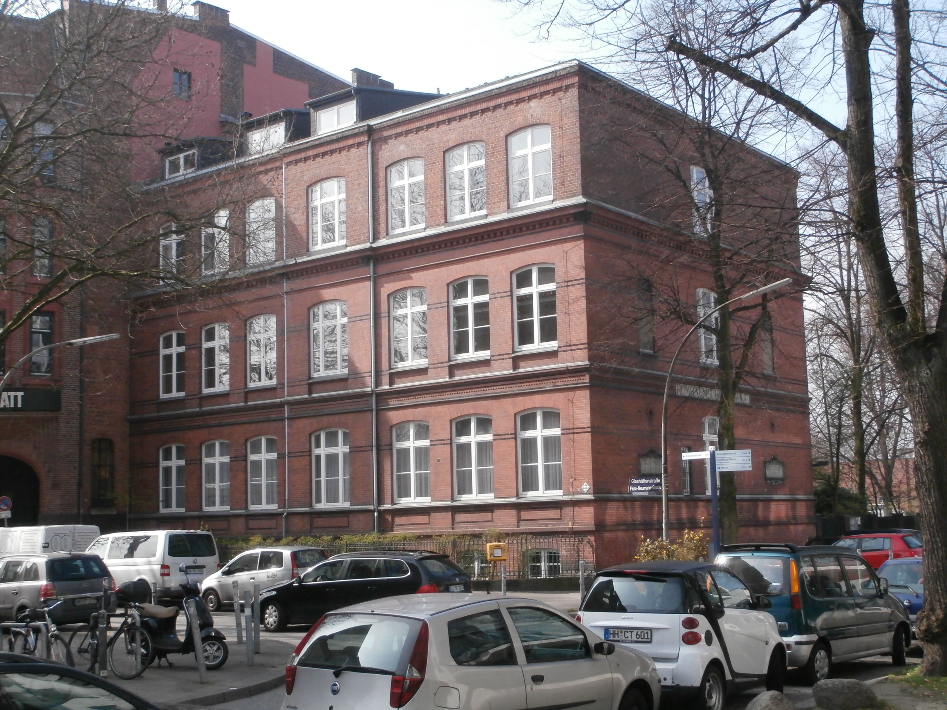 Rumbaumsche Schule von 1891/92This is a photograph of an architectural monument.